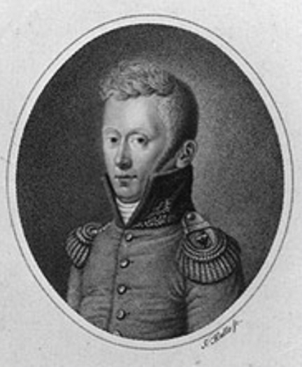 Justus von Gruner (* 28. Februar 1777; † 8. Februar 1820), königlich preußischer Geheimer Staatsrat und hochrangiger Staatsmann